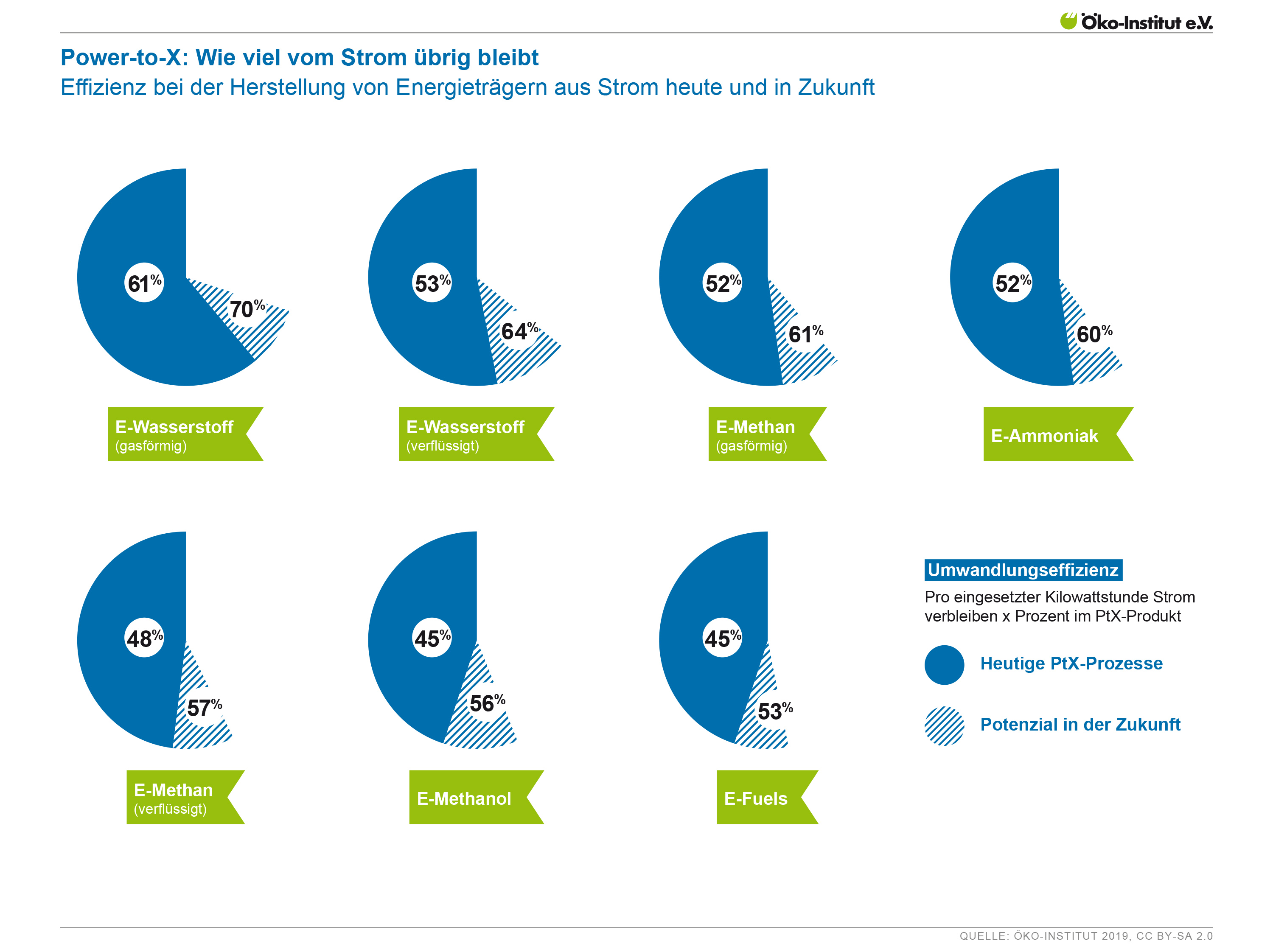 Effizienz von verschiedenen PtX-Anwendungen